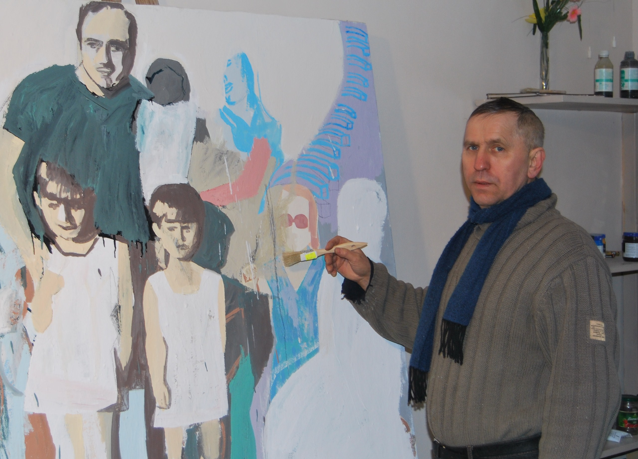 Eugeniusz Szczudło, Sobieszewo. Artysta w swojej pracowni w 2014 r.